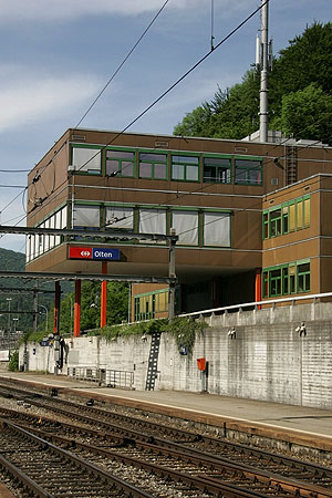 Stellwerk des Bahnhofs Olten